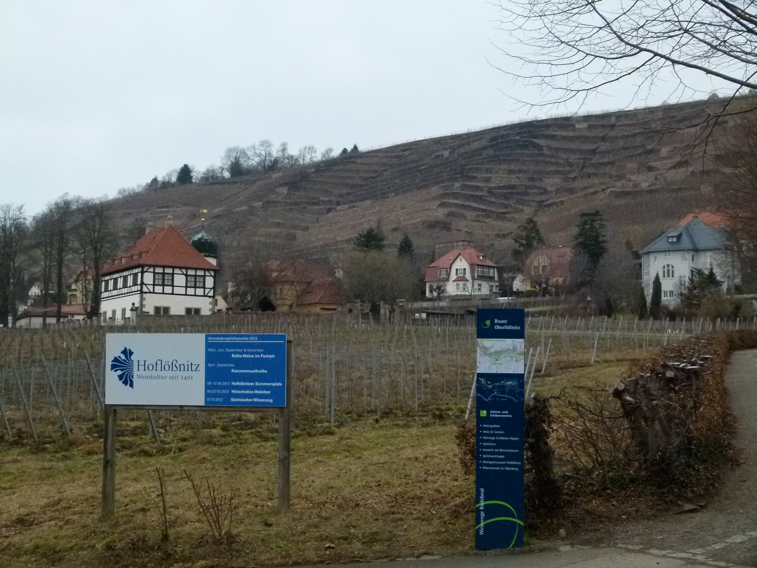 Hoflößnitz - Städtisches Weingut in Radebeul